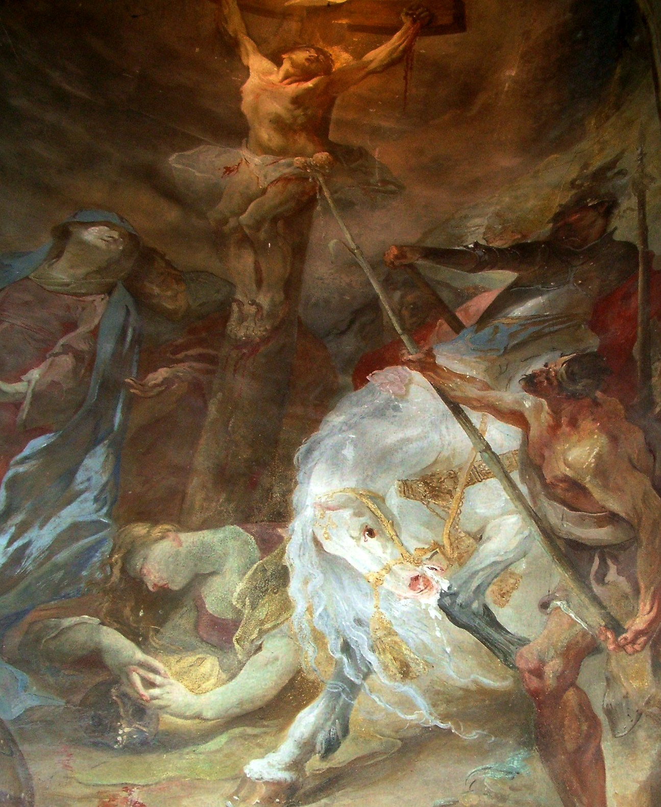 A sümegi plébániatemplom Maulbertsch-freskója